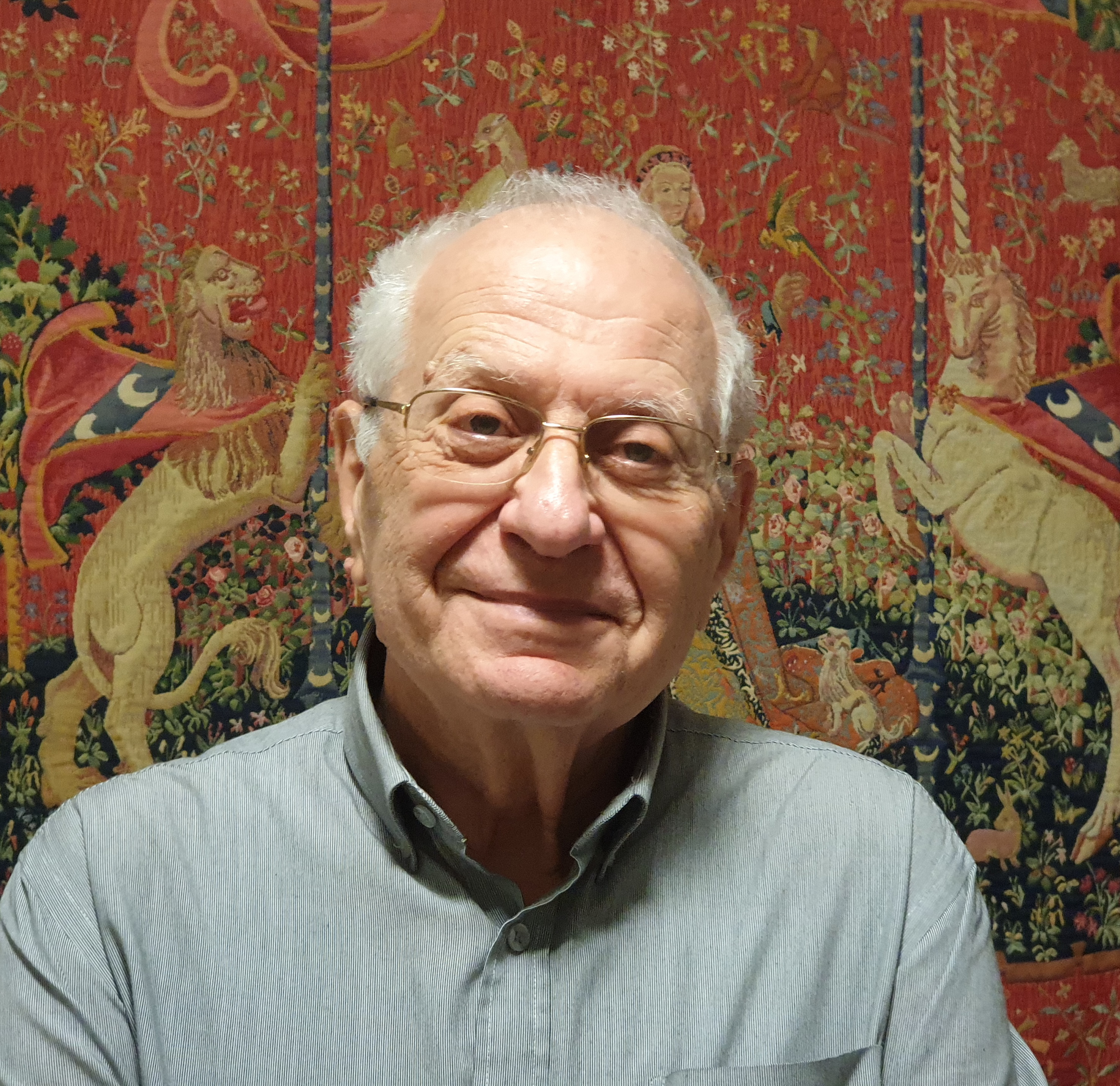 יורם כהן